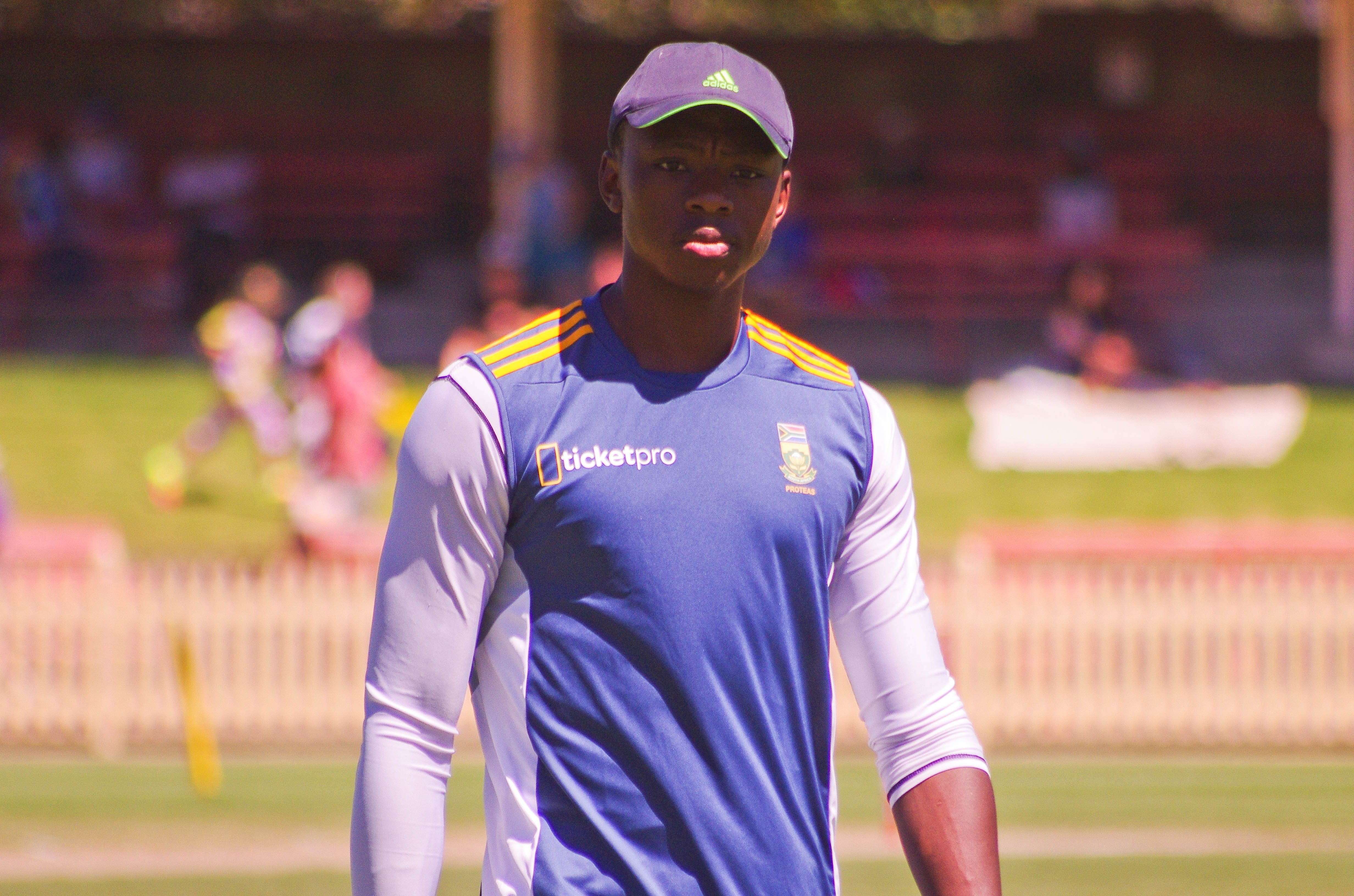 KAGISO RABADA